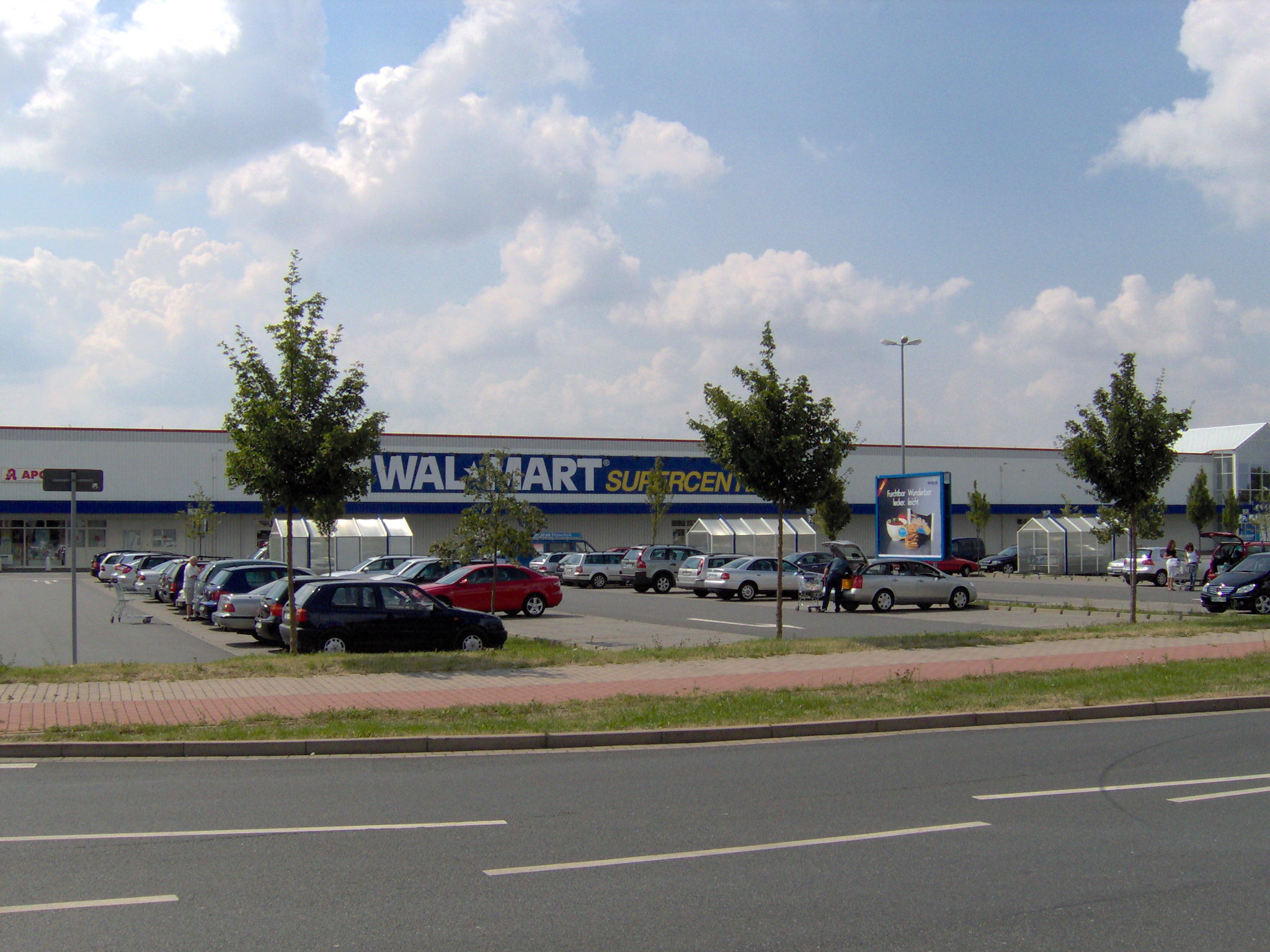 Wal-Mart Supercenter in Pattensen bei Hannover